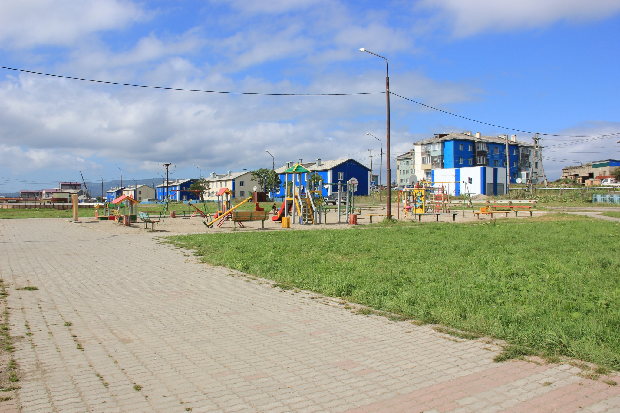 центральная площадь Южно-Курильска